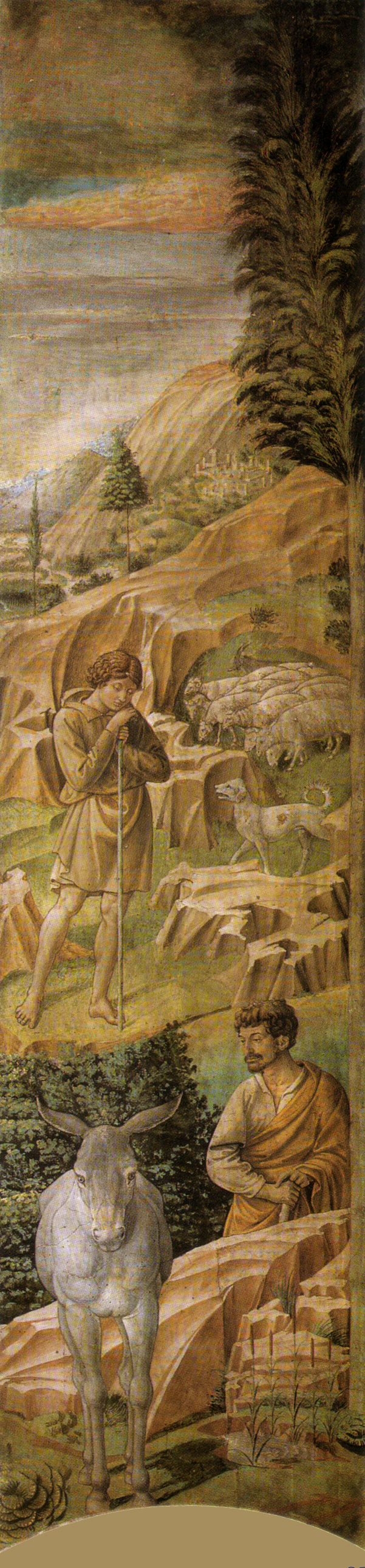 Detail from the fresco by Benozzo Gozzoli, in the "Cappella dei Magi", at Palazzo Medici Riccardi in Florence, Italy.